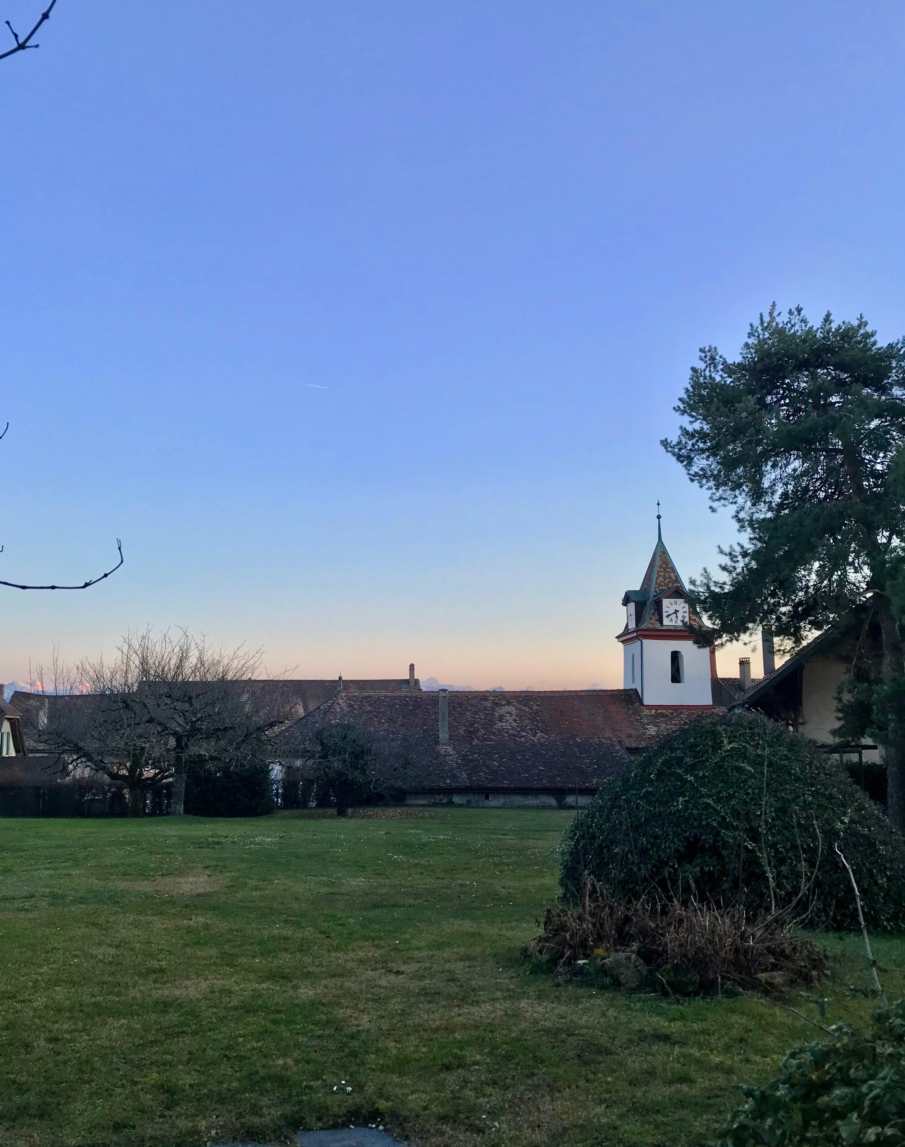 La parc communal de Saint-Livres (VD) avec le clocher de l'église protestante.